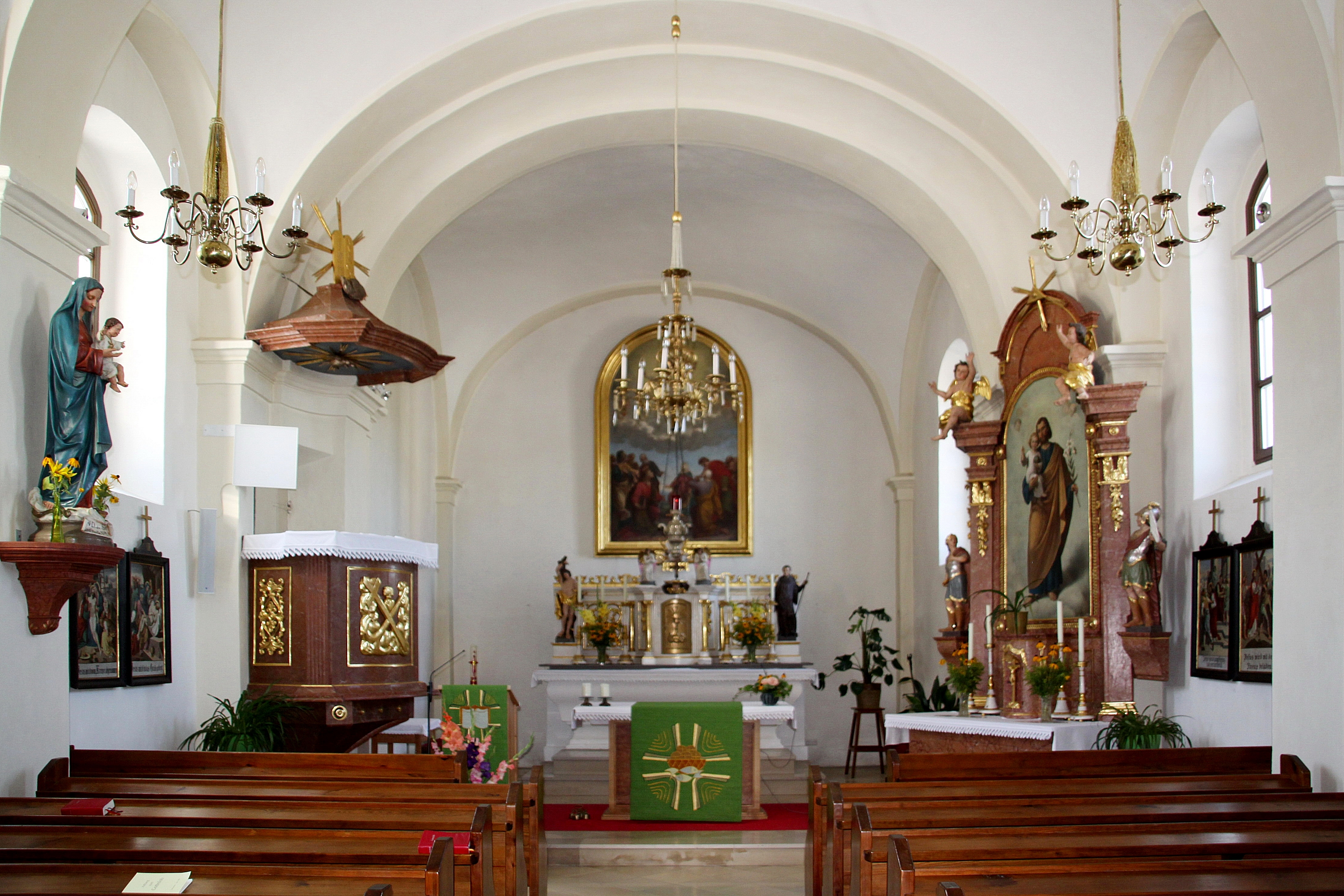 Innenansicht der Filialkirche in Oberrabnitz, Gemeinde Draßmarkt im Bezirk Oberpullendorf, Burgeland, Österreich)